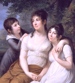 Portrait de Anne-Françoise du Lièpvre du Bois de Pacé (1761-1830), épouse de Claude-Louis Petiet (1778-1850) et ses enfants